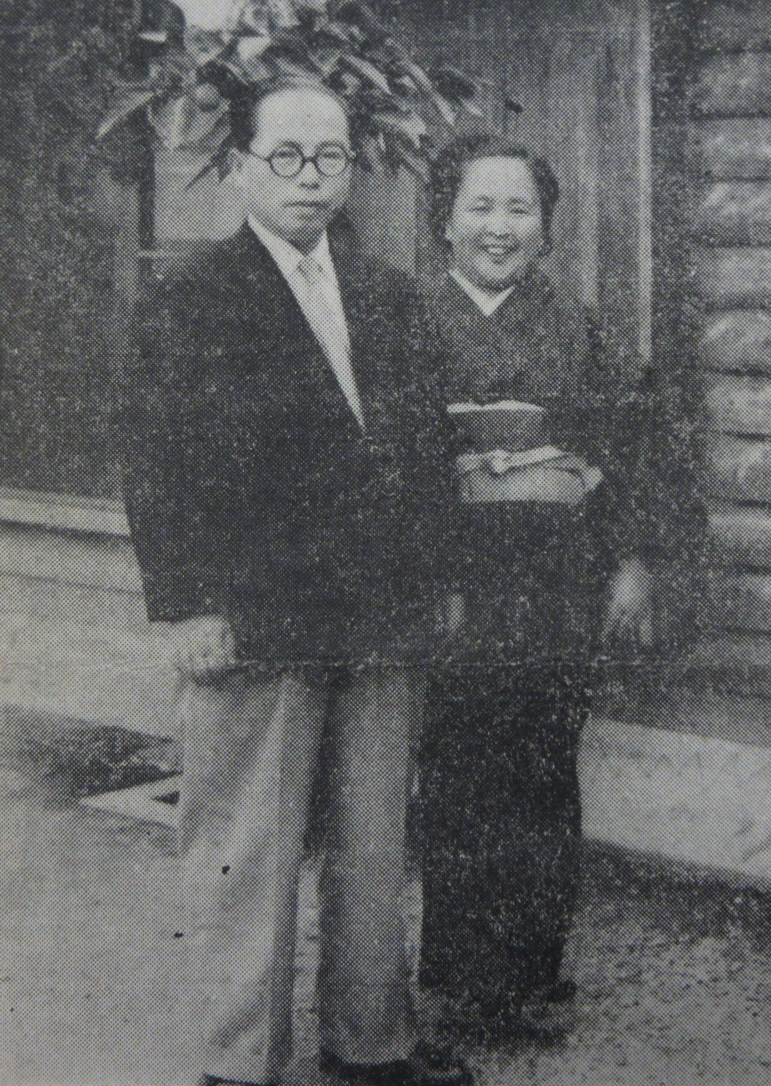 太田一夫衆議院議員と妻の芳江